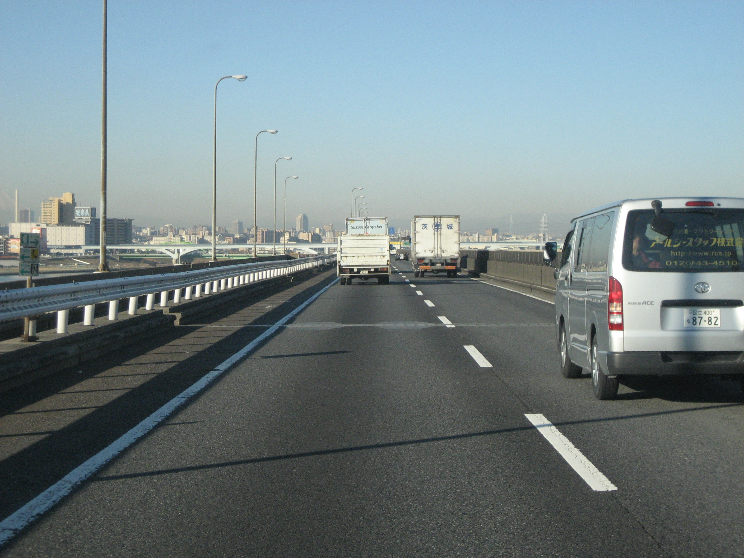 中央環状線と1号線との接続予定地付近